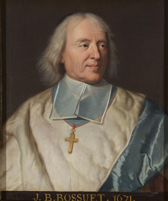 copie d'après un original de Rigaud (1702) conservé au musée du Louvre (inv 7506) est vêtu d'une chape prélatice doublée sur le dessus d'une fourrure sur laquelle reposent un rabat blanc et une croix pectorale